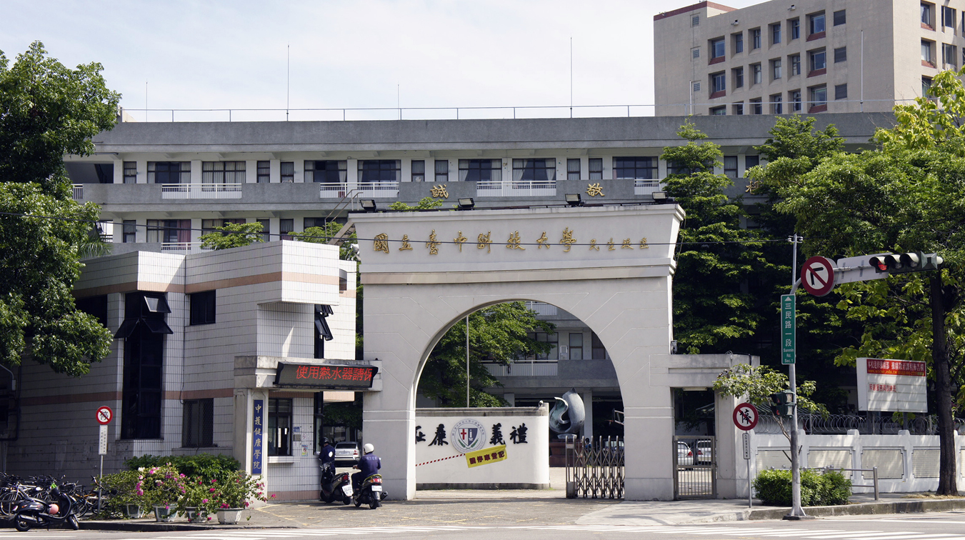 中文（台灣）: 國立臺中科技大學民生校區大門。